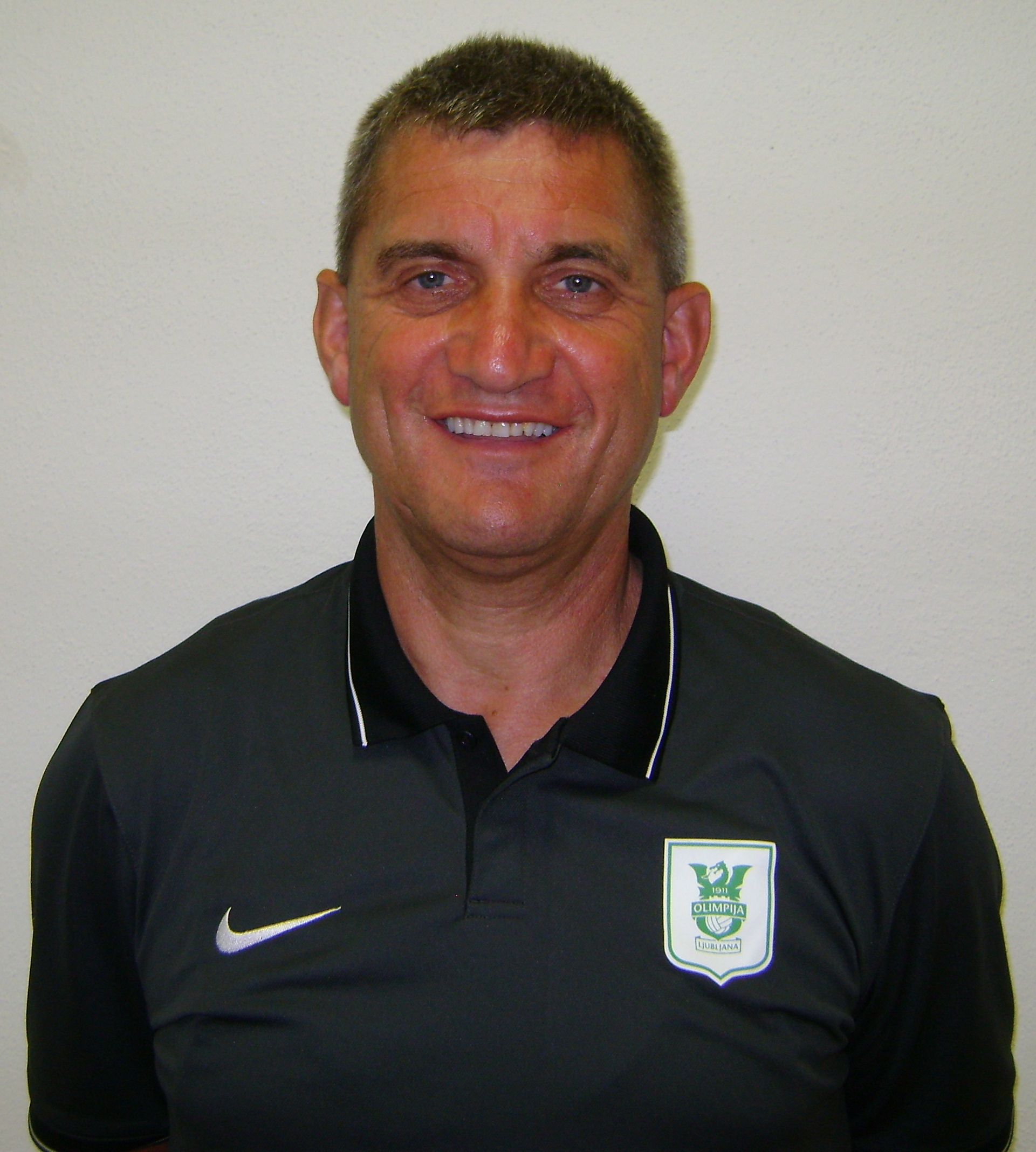 Marijan Pušnik